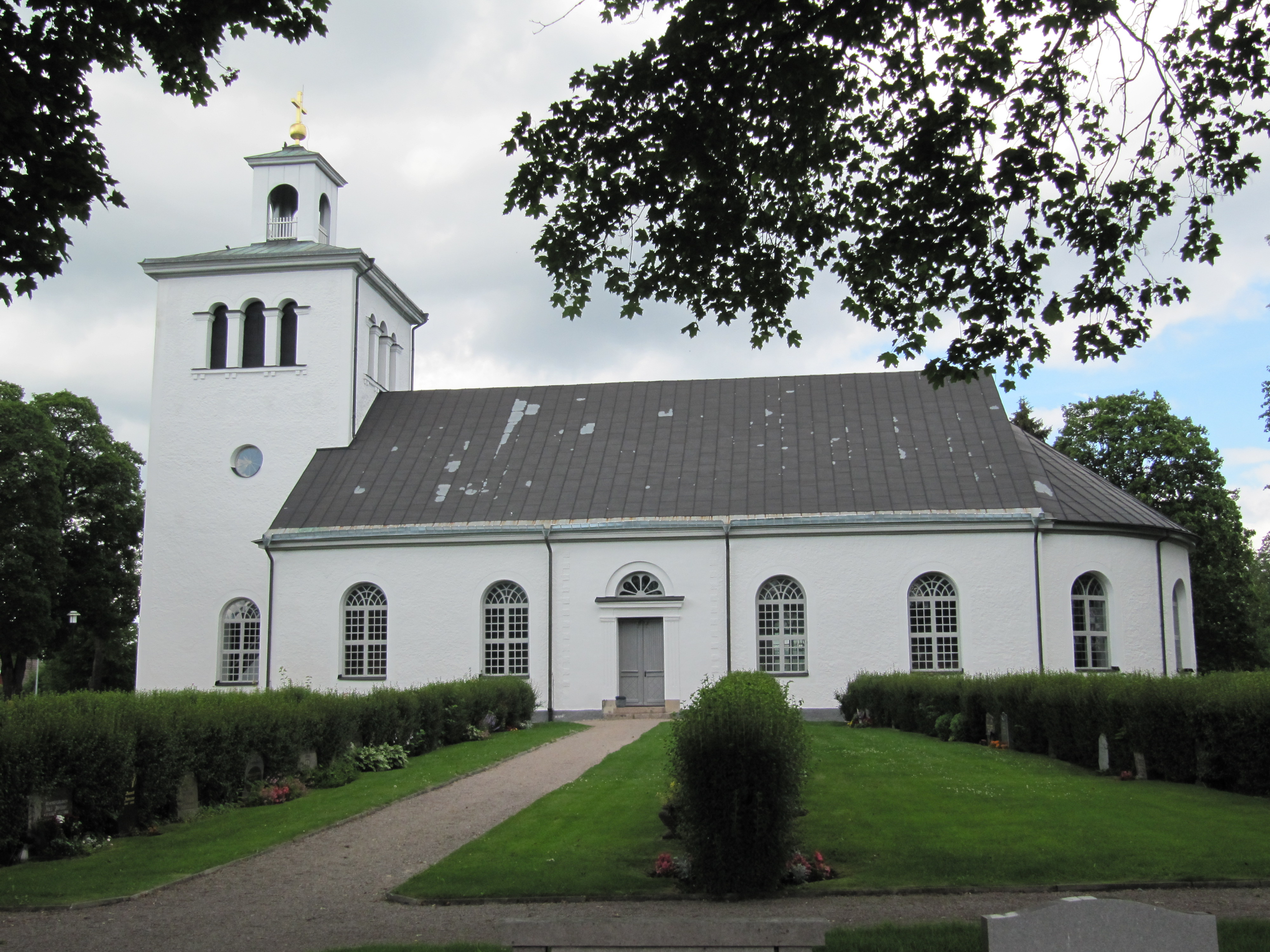 Skede kyrka